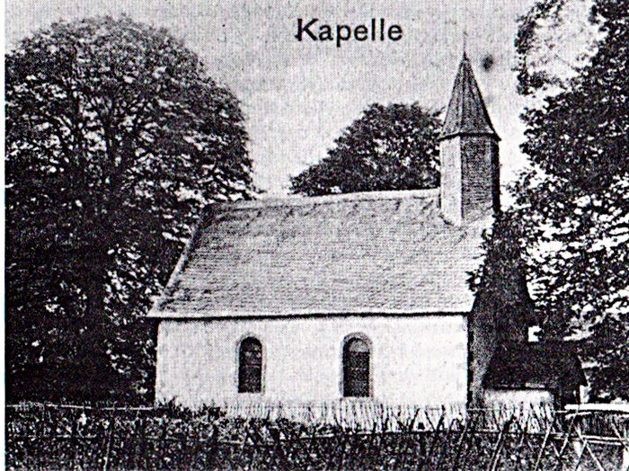 Brilon, Wülfte, St. Anna-Kapelle, Zustand von 1910